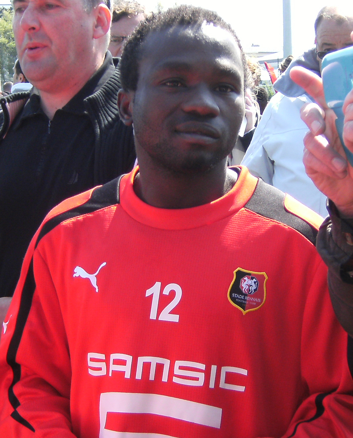 Photo prise lors d'un entraînement du Stade rennais au stade de Marville de Saint-Malo le 3 mai 2013. Ejike Uzoenyi entouré de supporters.